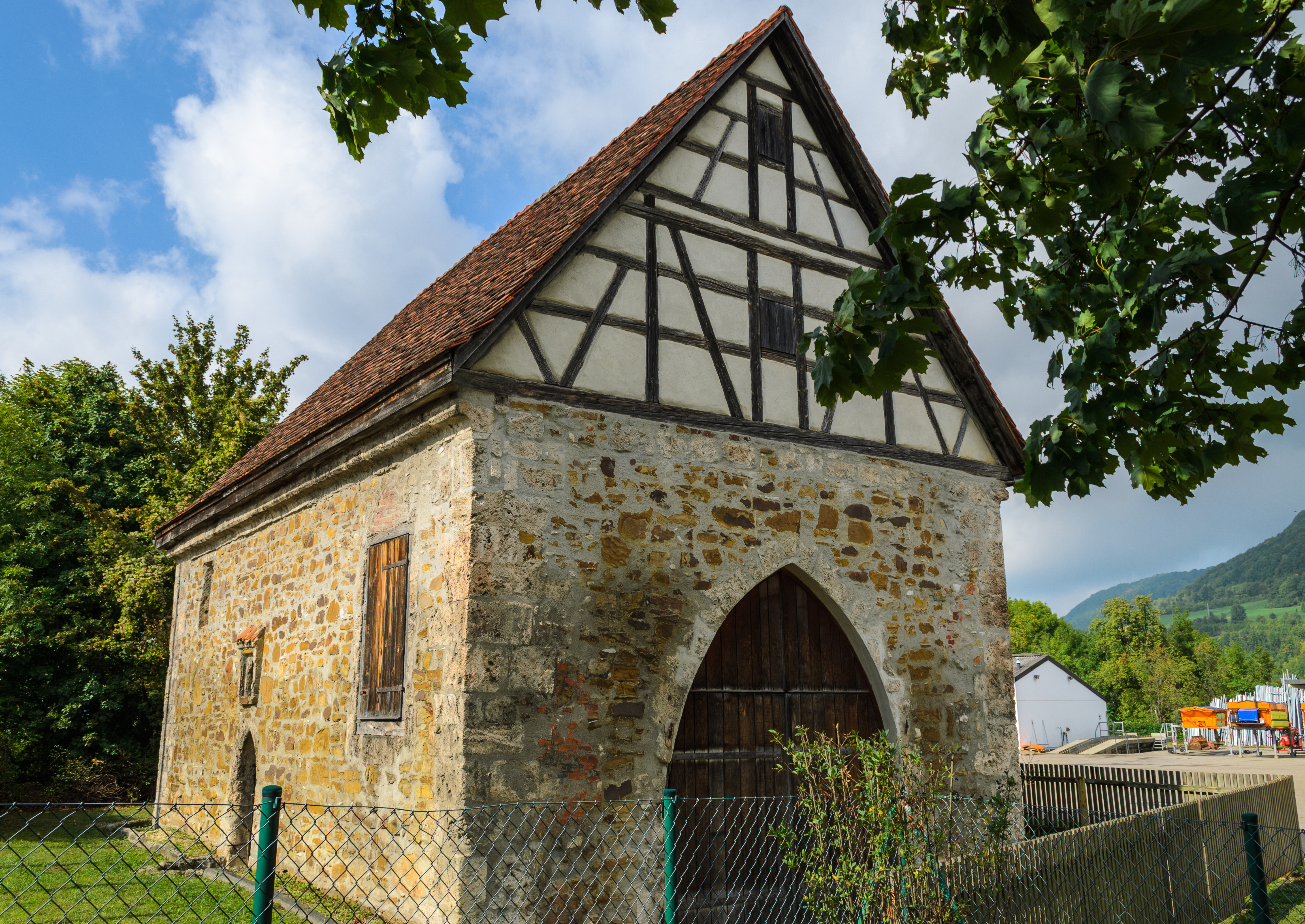 Erste urkundliche Erwähnung 1471